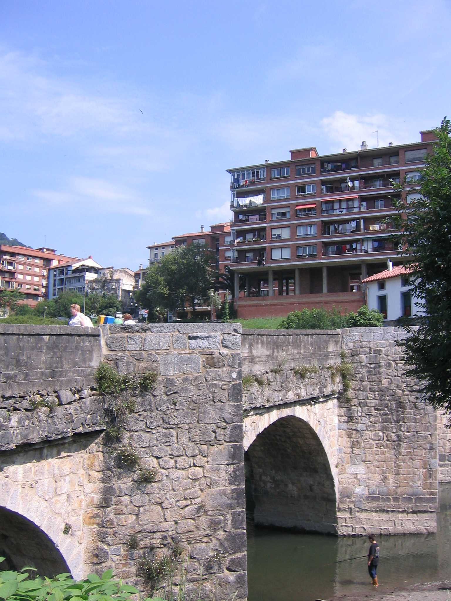 Punete sobre el río Urola en Cestona, Guipúzcoa, País Vaco, España.